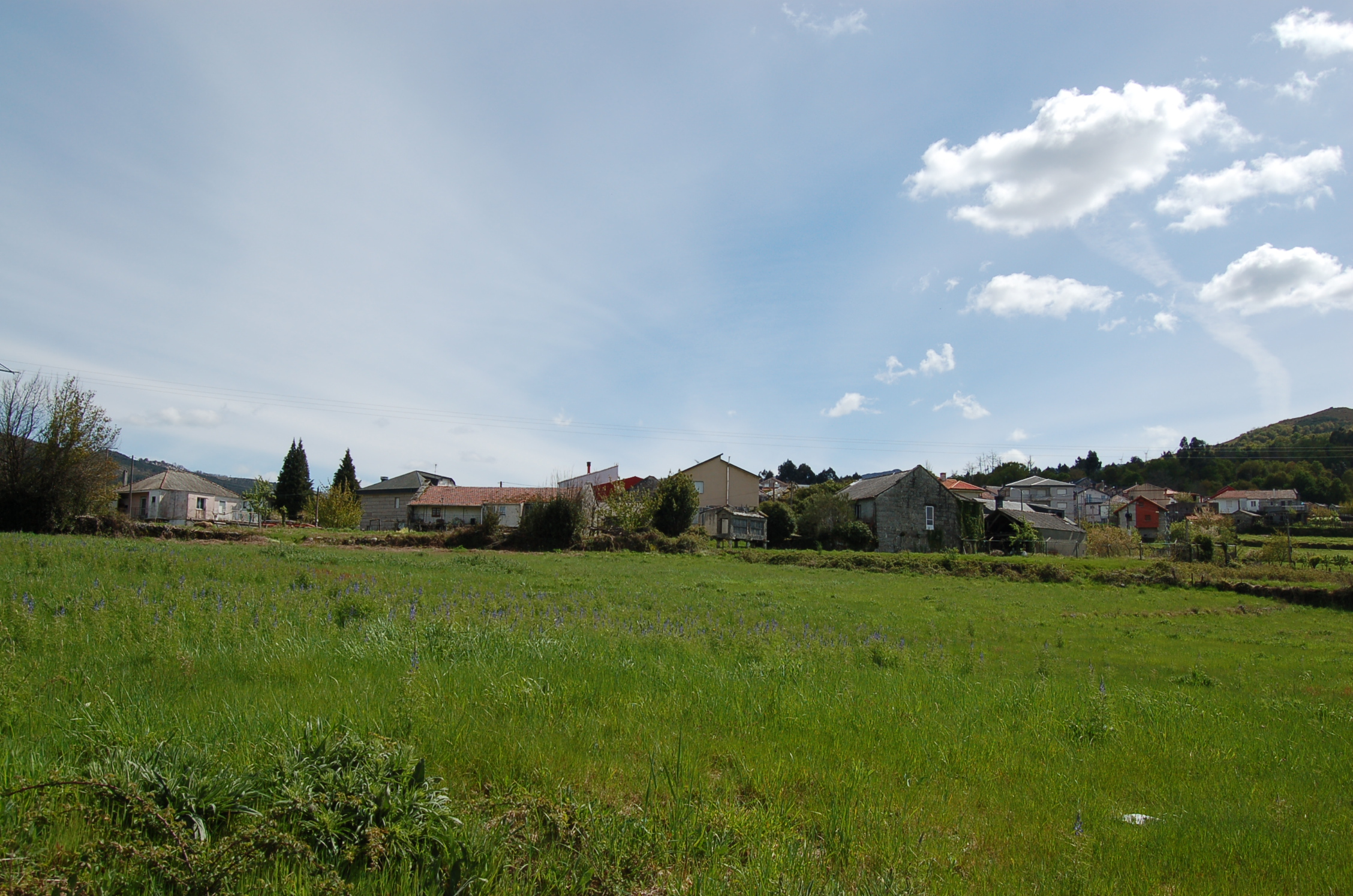 Aldea de Barroso, na parroquia de Barroso, no concello de Melón. Vista desde a igrexa parroquial de Santa Baia